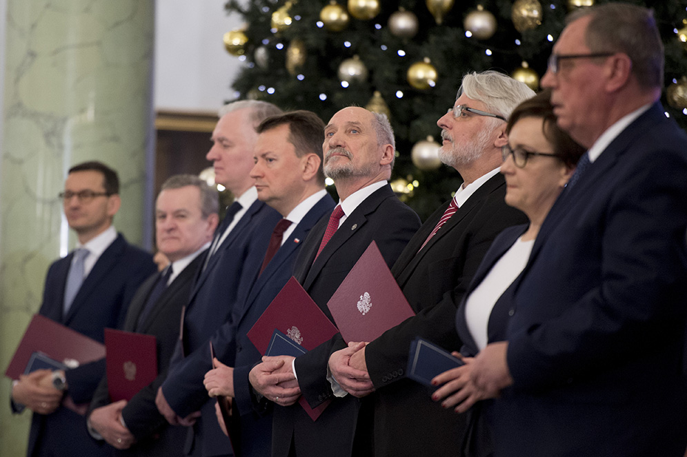 Pałac Prezydencki w Warszawie, uroczystość zaprzysiężenia rządu Mateusza Morawieckiego.